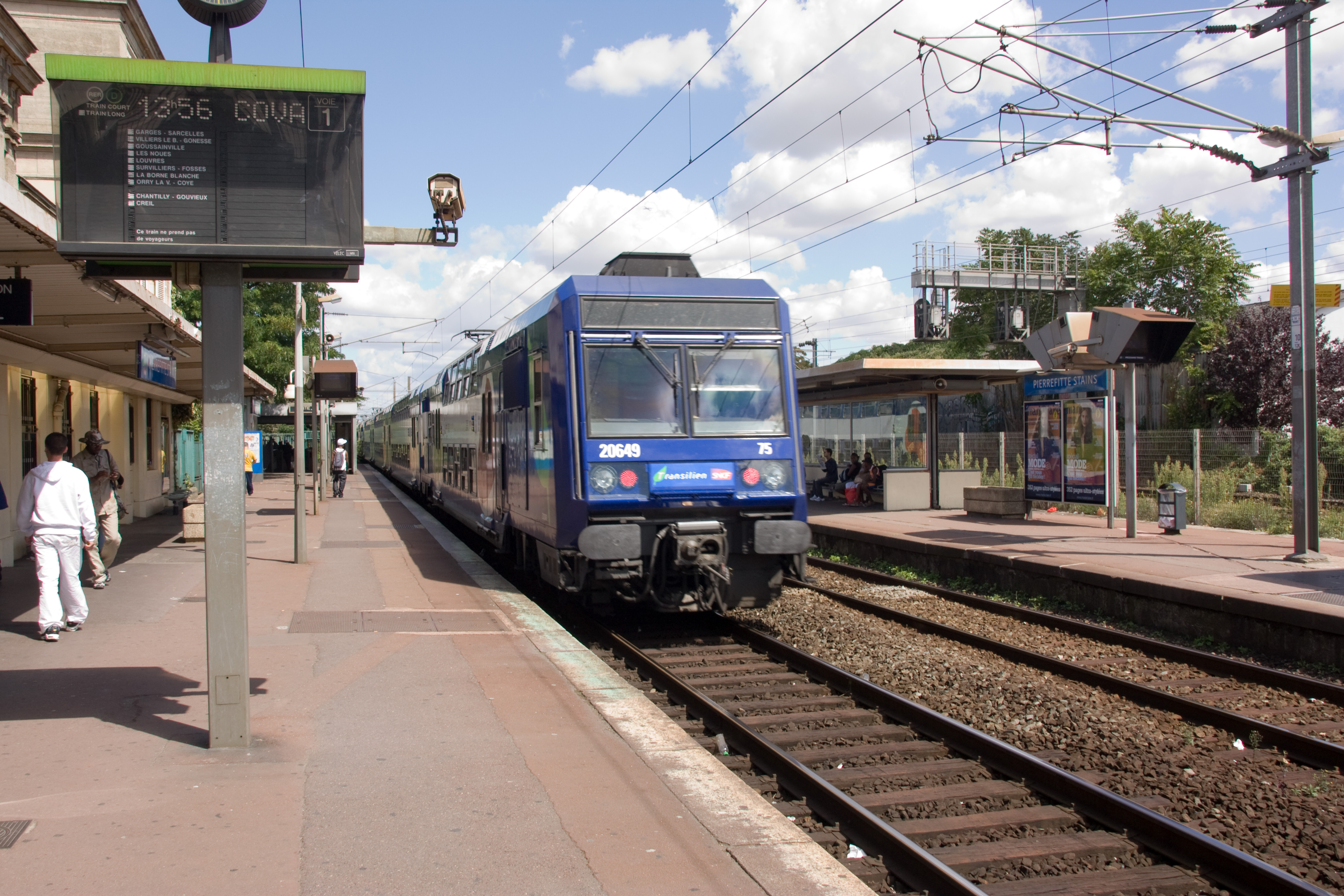 La Gare de Pierrefitte-Stains, département de Seine-Saint-Denis, France